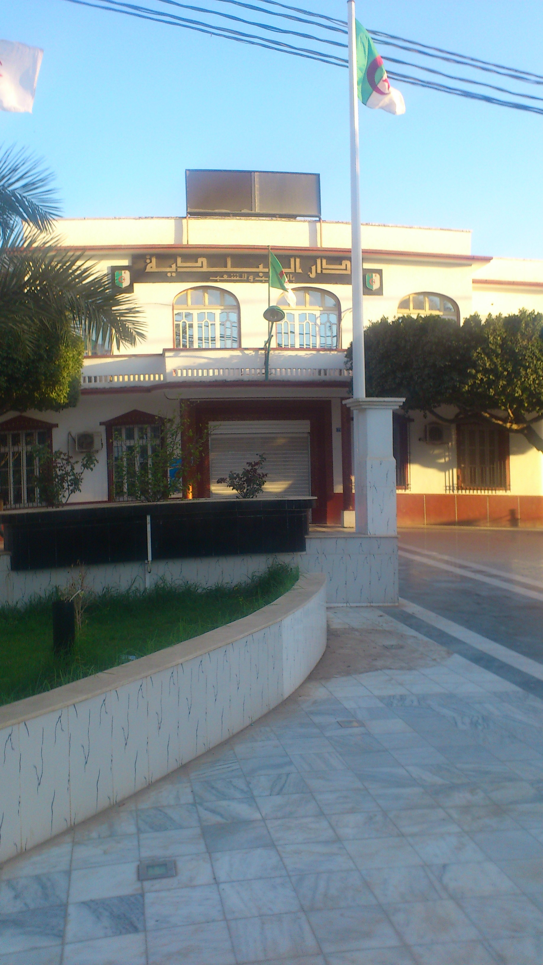 la mairie de Boukadir